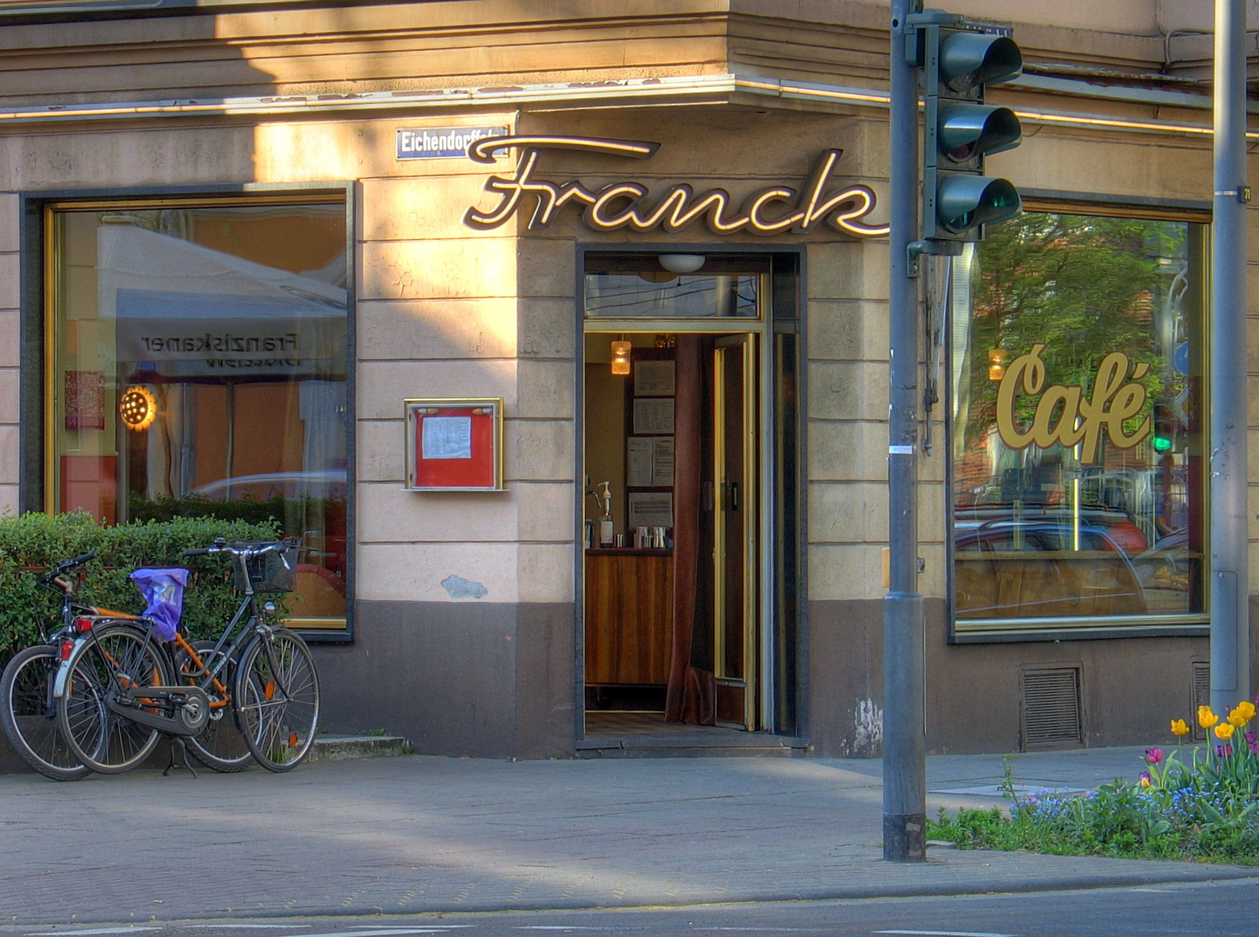 Cafe Franck, Eichendorffstraße 30, Köln-Ehrenfeld